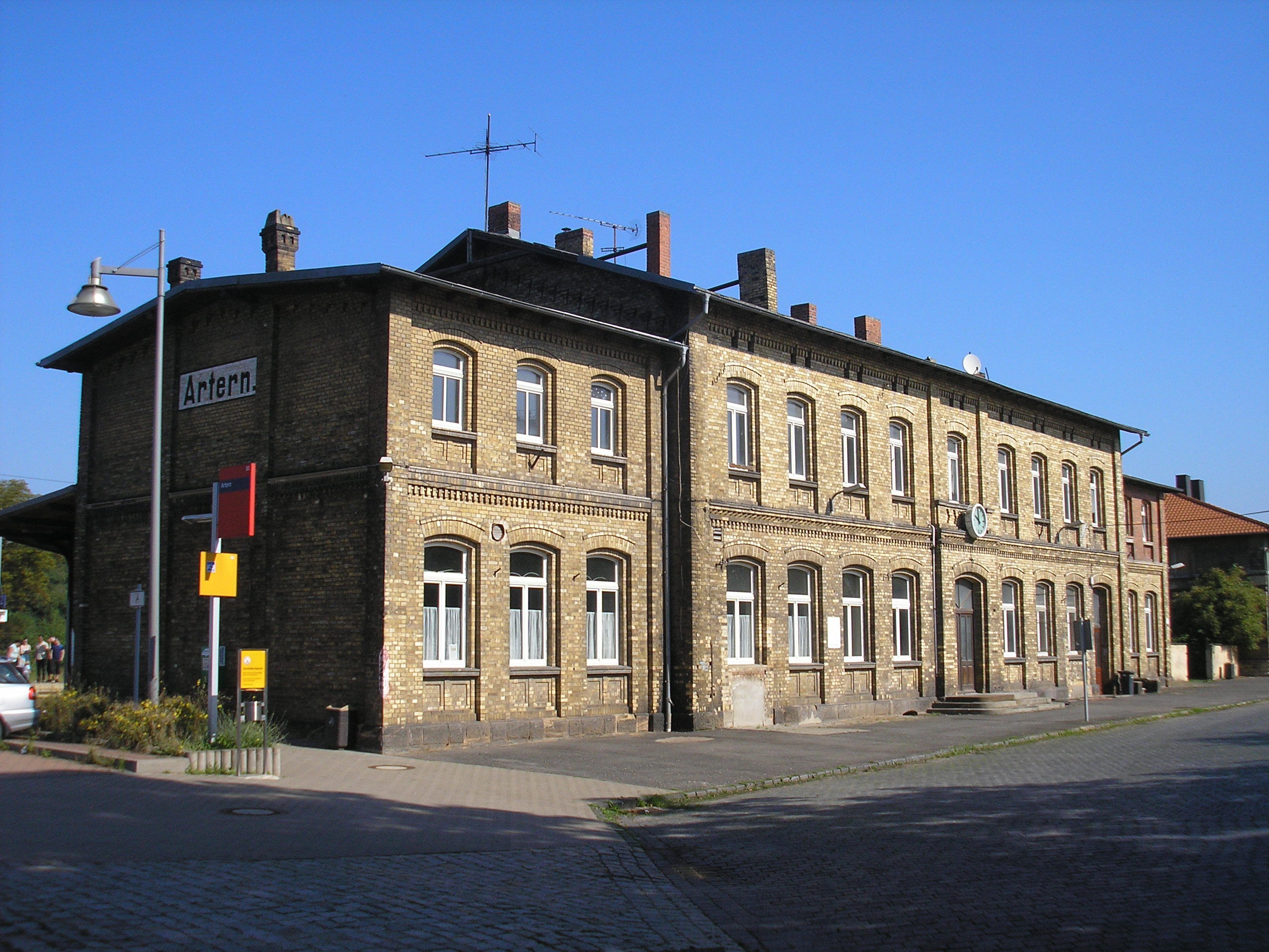 Der Bahnhof in Artern (Thüringen).